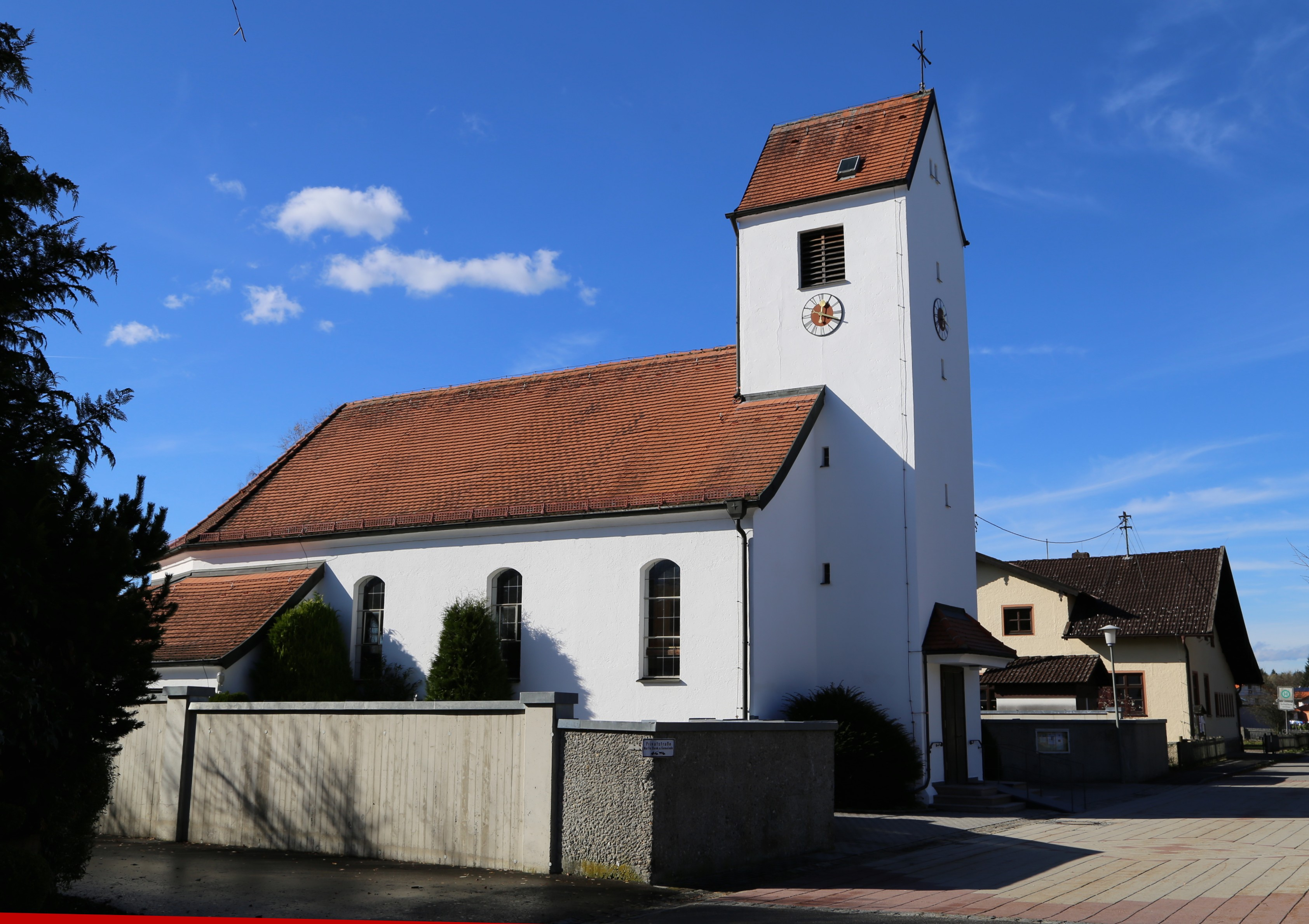 Hauptstraße 6; Kath. Kuratiekirche St. Theresia von Lisieux, Saalbau mit westlichem Sattelturm, 1928; mit Ausstattung. D-1-87-165-15